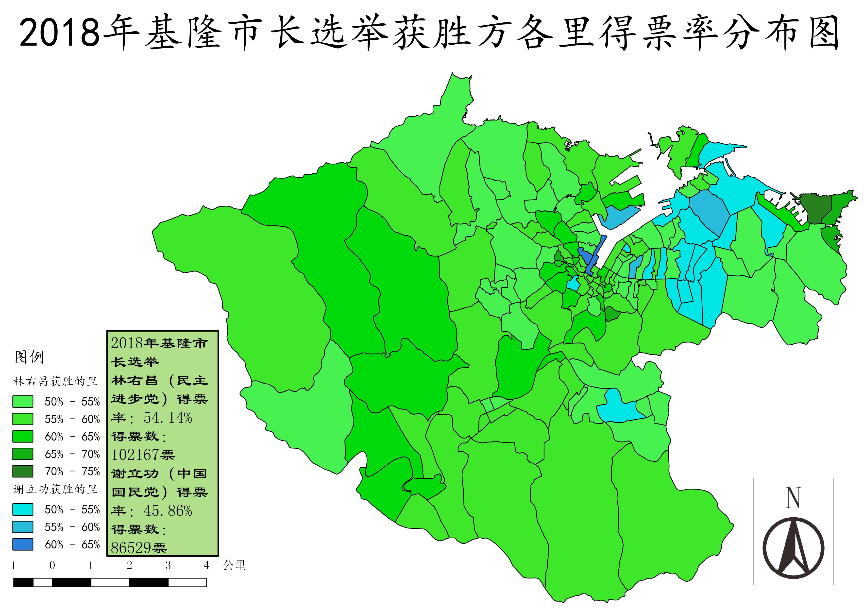 中文（中国大陆）: 绿色为民主进步党候选人林右昌获胜的里，蓝色为中国国民党候选人谢立功获胜的里。